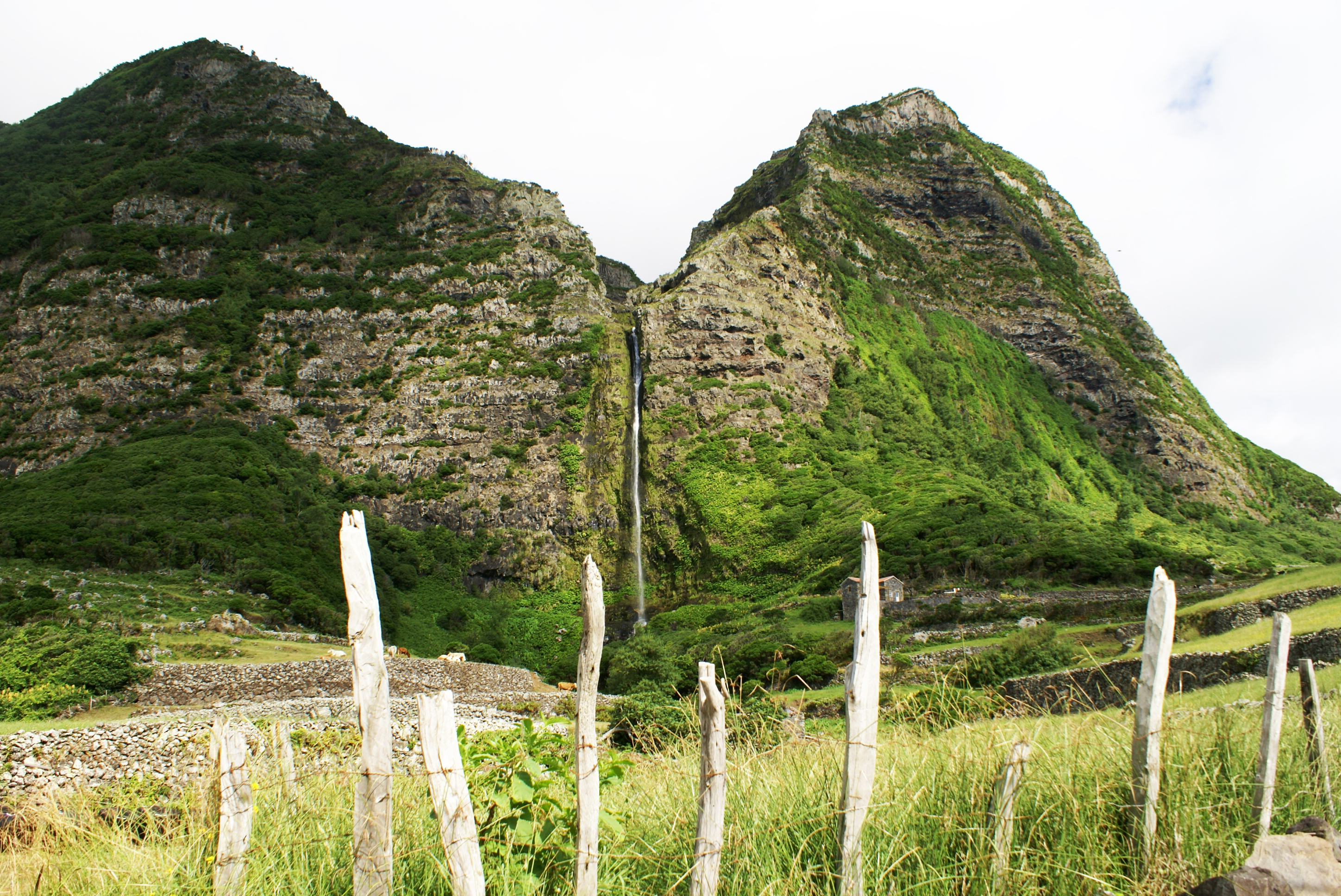 Cascata do Poço do Bacalhau, Fajã Grande, Arquivo de Villa Maria, ilha Terceira, Açores